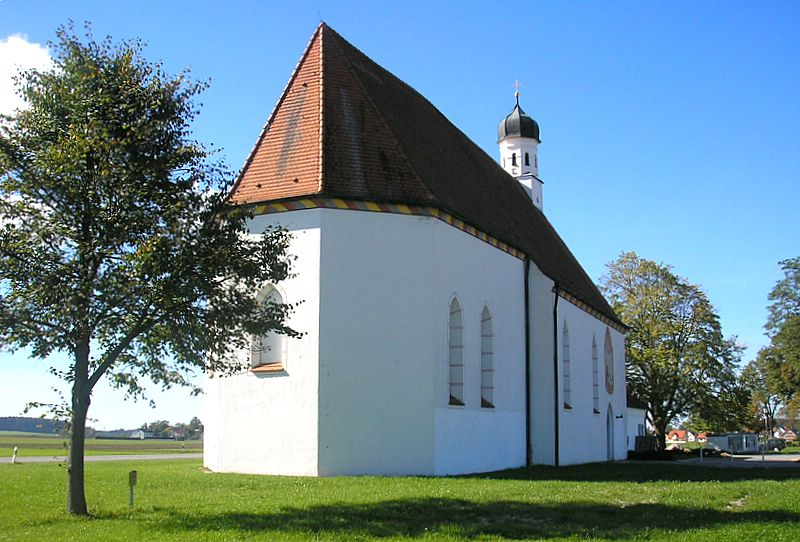 Wallfahrtskirche St. Willibald (Jesenwang, Landkreis Fürstenfeldbruck, Oberbayern). Ansicht von Osten. Eigene Aufnahme, Okt. 2006 / Pilgrimage church St. Willibald at Jesenwang (Upper Bavaria, Germany). View from the east. Own photo, Oct. 2006